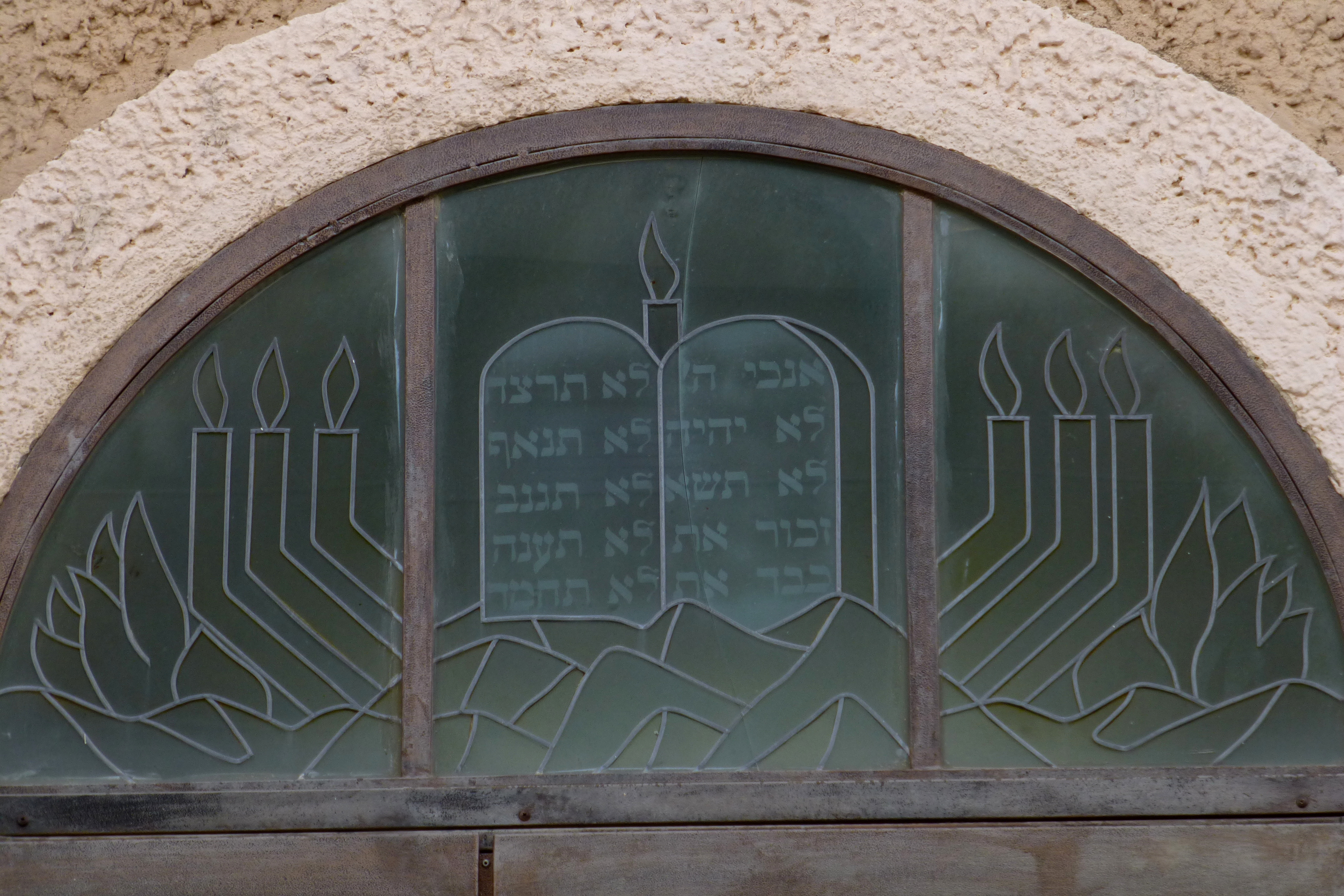 בית הכנסת הגדול "אוהל שרה" - בית הכנסת הראשון של רחובות, נבנה בשנת תרס"ד? ובהמשך שופץ והורחב והיה למוקד הקהילתי והחברתי של המושבה הצעירה.